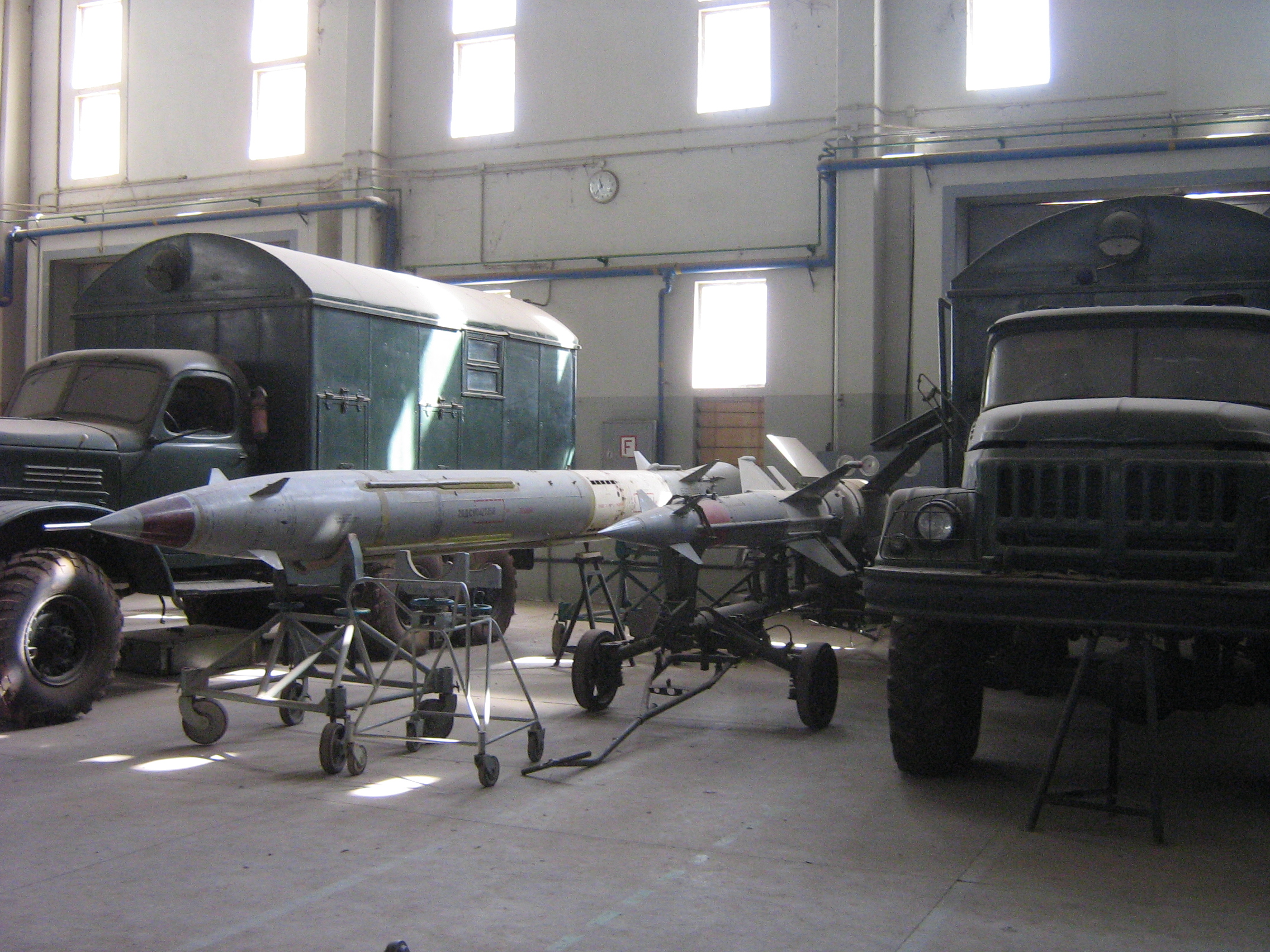 Ракеты советского производства на техобслуживании в ПВО Ливии.